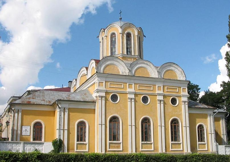 Храм Чернігівських святих князя Михайла і боярина Федора (серпень 2005)